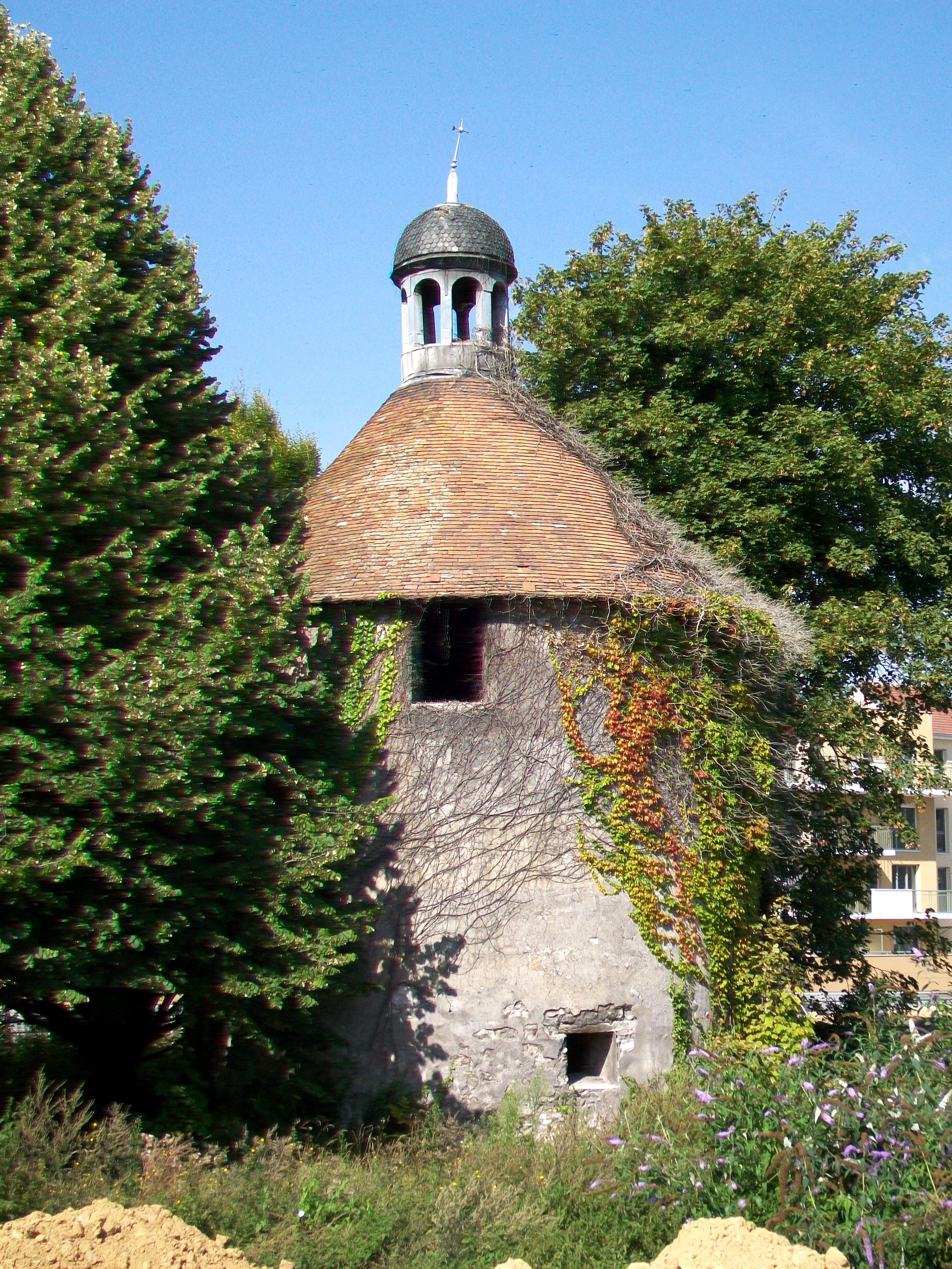 Le colombier de Garlande, 1 rue de Chauvart, sur un terrain vague. Le colombier faisait partie de la ferme de Miville appartenant aux Garlande, dont il est le seul vestige. Le bâtiment comporte deux salles superposées, comportant 1658 boulins.